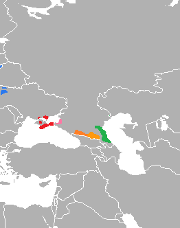 Lenguas cumano-nogaya, de la rama de las lenguas túrquicas noroccidentales, de la familia altaica. Idioma cumuco Idioma karaim Idioma karachai-balkar Idioma cremortártaro Idioma urrumano